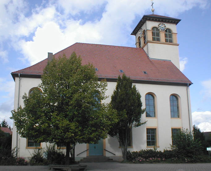 Kirche in Berwangen (Kirchardt, Lkr. Heilbronn), erbaut 1824